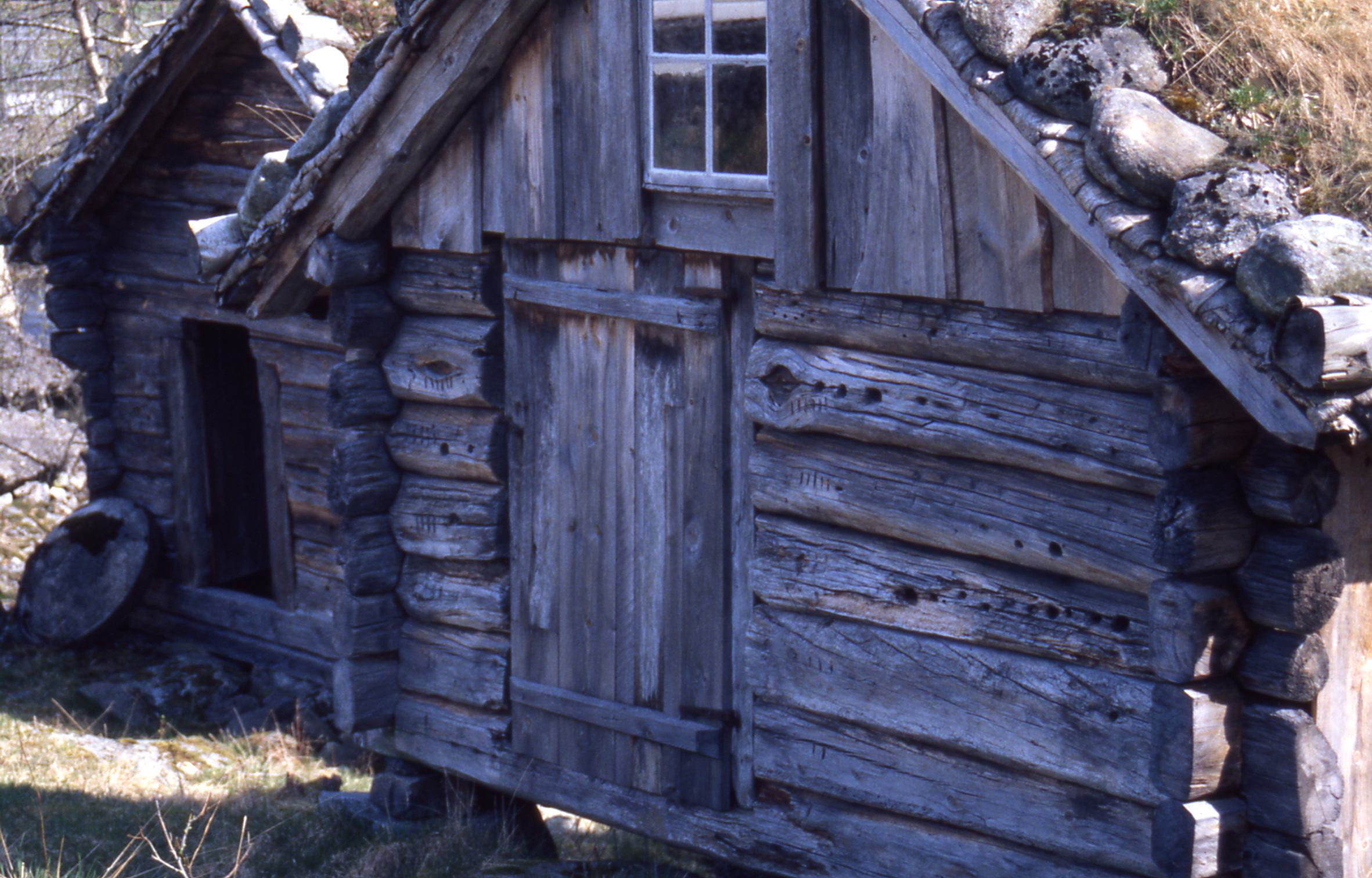 Norsk (nynorsk): På Øystad i Kvilldal i Suldal er det eit kvernhusanlegg som høyrer til Ryfylkemuseet.